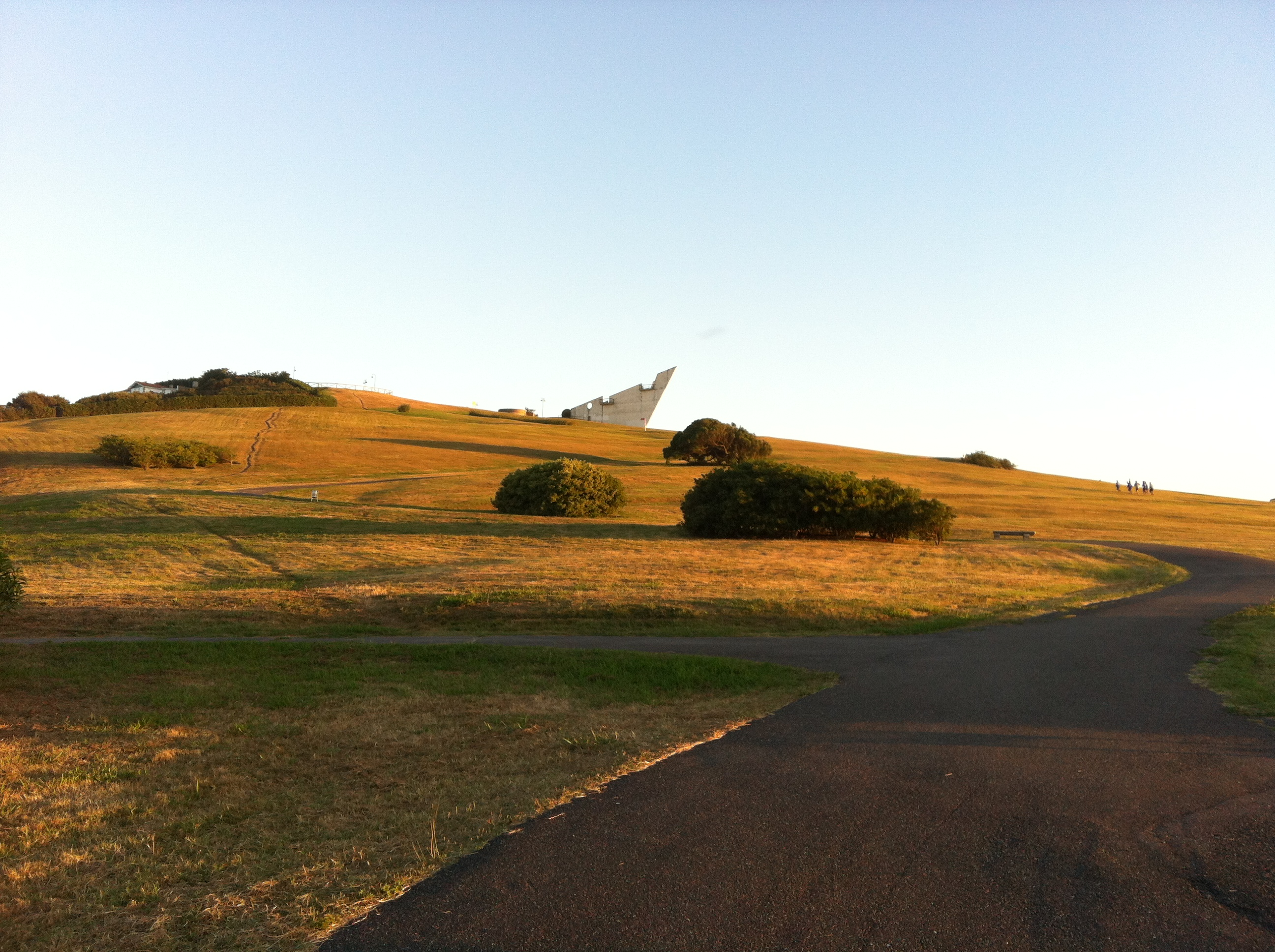 Vista del mirador del parque del cabo de San Lorenzo, Somió (Gijón). España